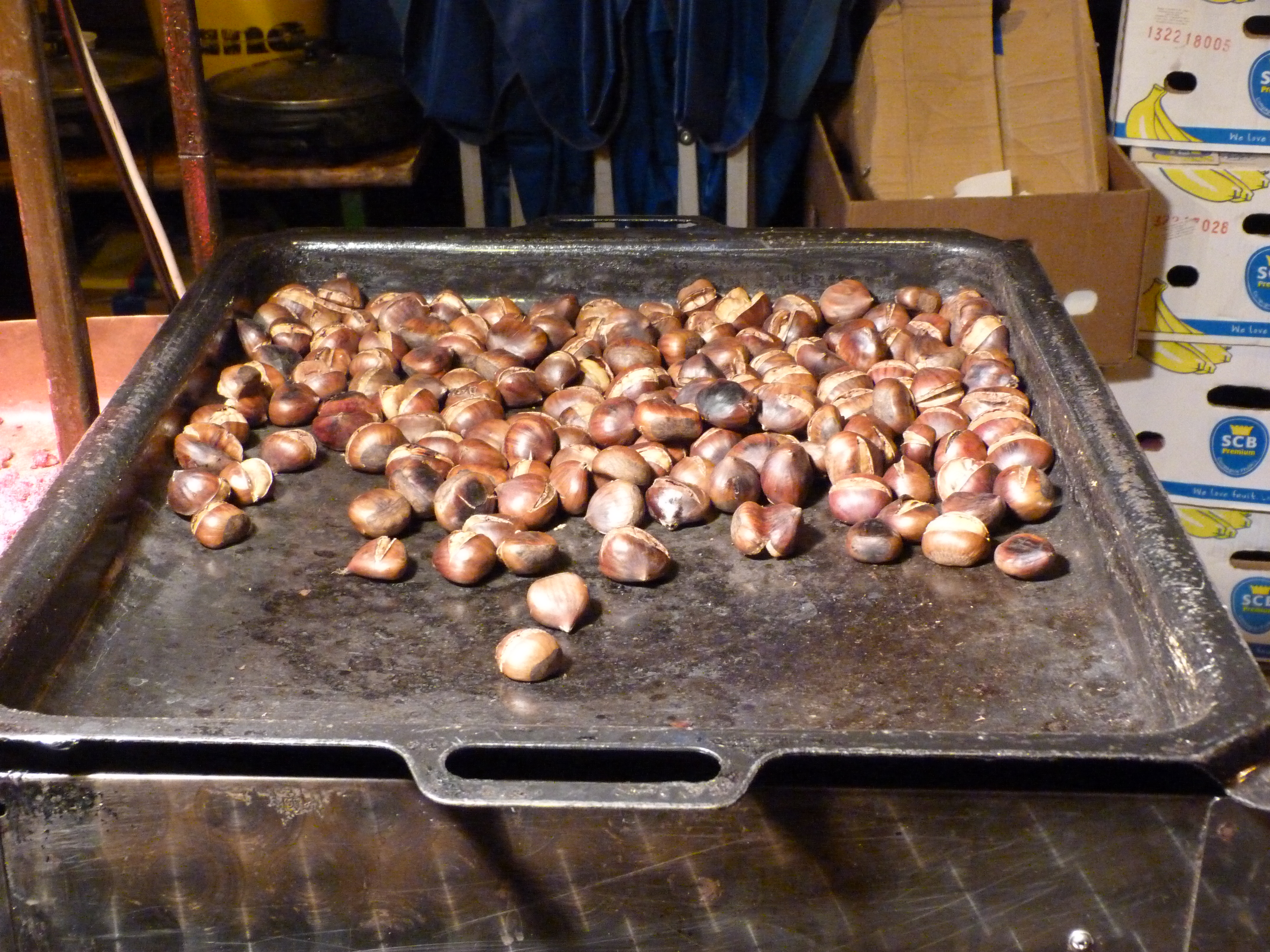 A felvétel 2015. február 7-én szombaton készült Miskolcon. Miskolci Kocsonyafesztivál. ©© Derzsi Elekes Andor, Budapest, 2015, Published in the Metapolisz DVD line. You are authorised to use this photo under Creative Commons – even for commercial, for profit purposes. The vid must be attributed to Derzsi Elekes Andor. All of the photos and vids in the Metapolisz DVD line are under Creative Commons and can be used even for commercial – for profit – purposes. Recommended Citation Derzsi Elekes Andor: Metapolisz DVD line